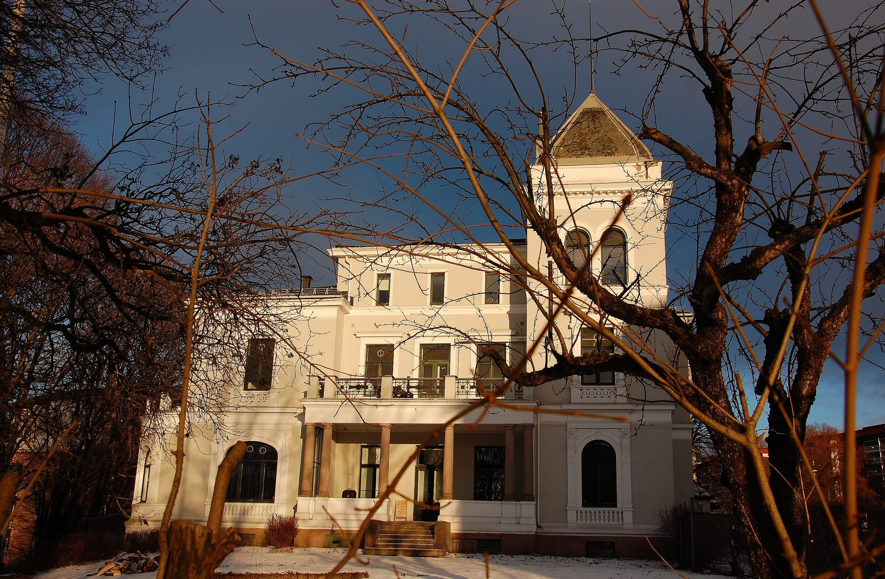 Sandakerveien 52, Blystadboligen. Tidligere villa i Sandakerveien 52, reist for fabrikkeier Hartvig Bache-Wiig (1850—1922) i 1891 ved ark. Harald Olsen. Bache-Wiig var eier av Akerselvens Papirfabriker, det tidligere Bentse Brug.